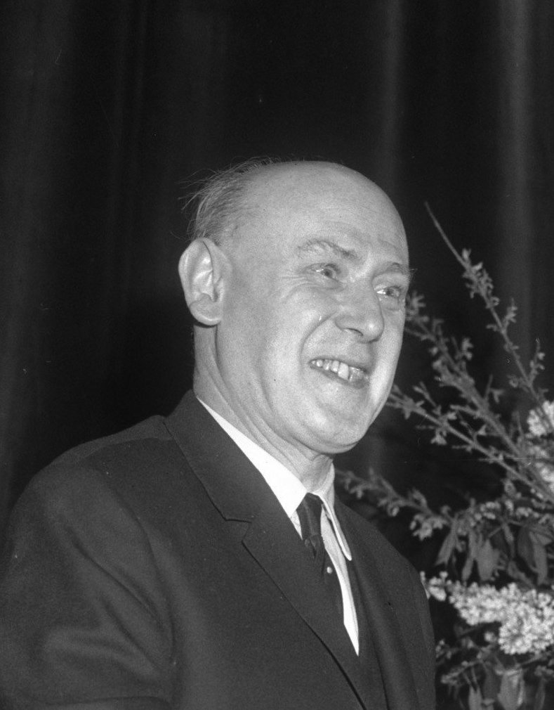 Collectie / Archief : Fotocollectie Anefo Reportage / Serie : [ onbekend ] Beschrijving : Uitreiking Albert Schweitzerprijs , prof. dr. A.M.A. de Waelhens Datum : 15 januari 1966 Trefwoorden : prijsUitreikingen Persoonsnaam : Waelhens, Alphonse de Fotograaf : Bilsen, Joop van / Anefo Auteursrechthebbende : Nationaal Archief Materiaalsoort : Negatief (zwart/wit) Nummer archiefinventaris : bekijk toegang 2.24.01.04 Bestanddeelnummer : 918-6799